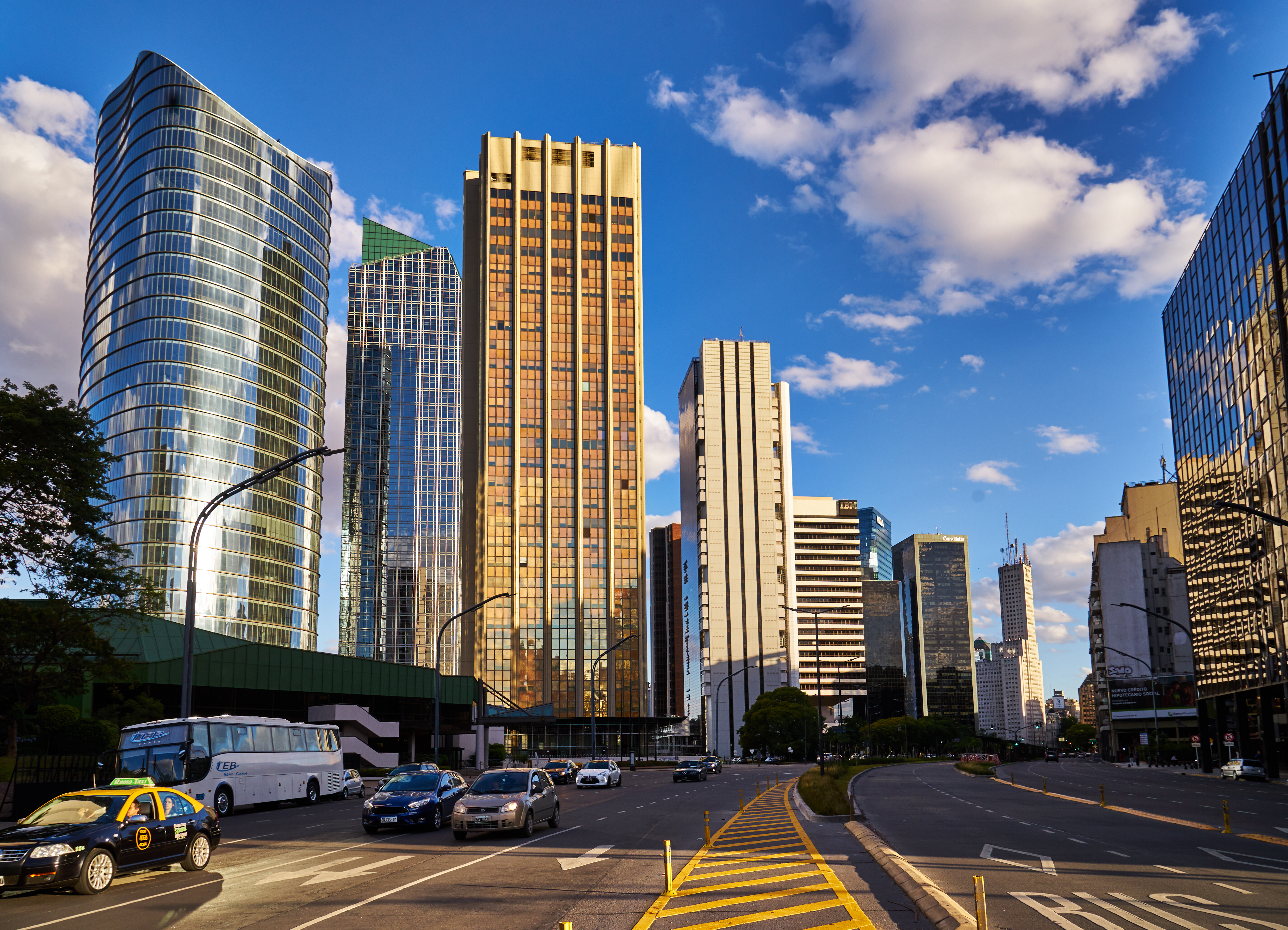 Buenos Aires